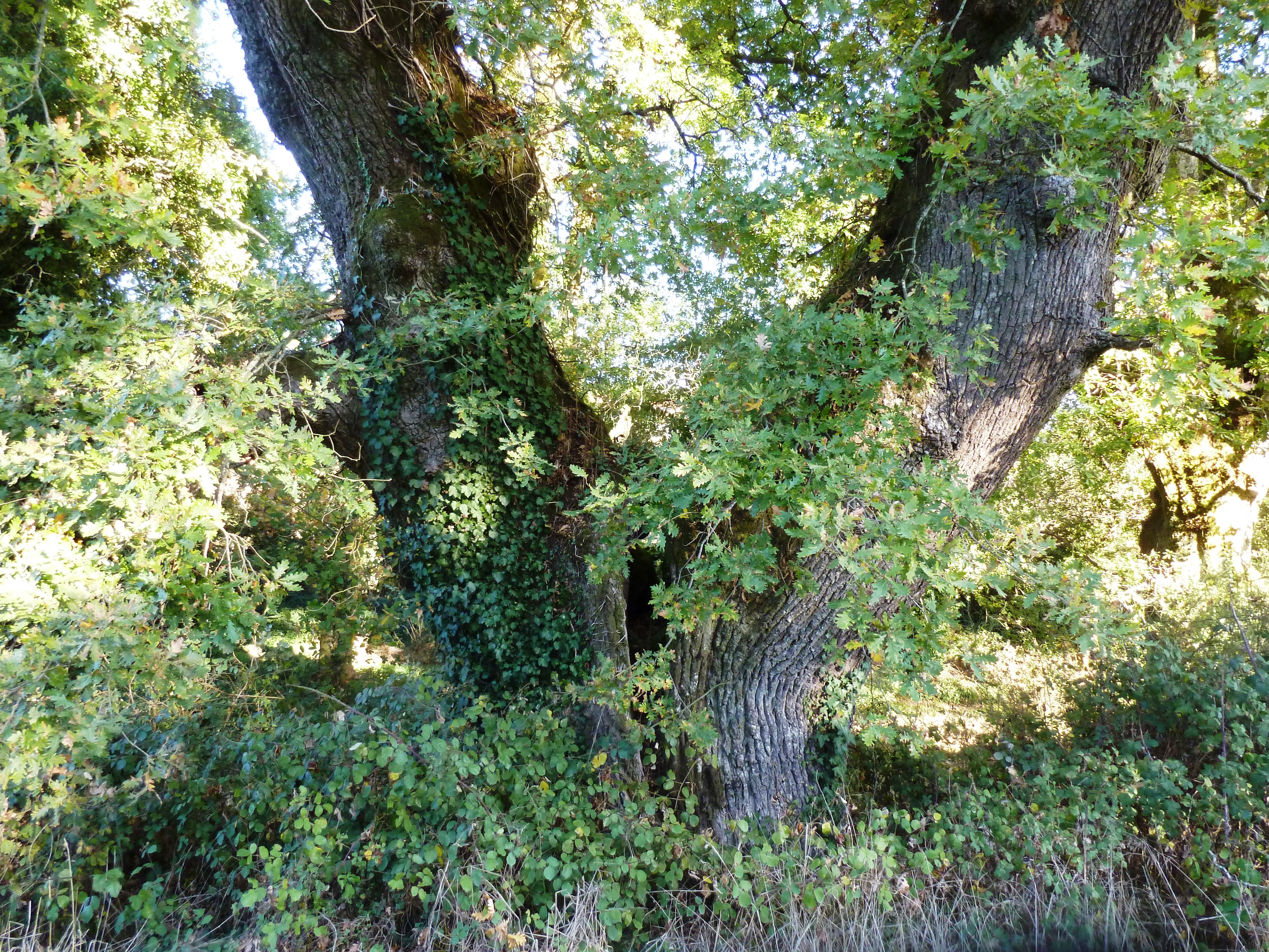 Carballo do Mestre, O Barrio de Puga, Carballedo